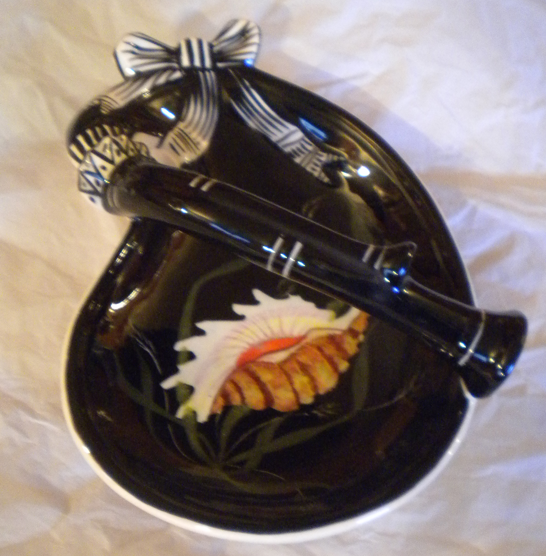 Henriot; Trevoux